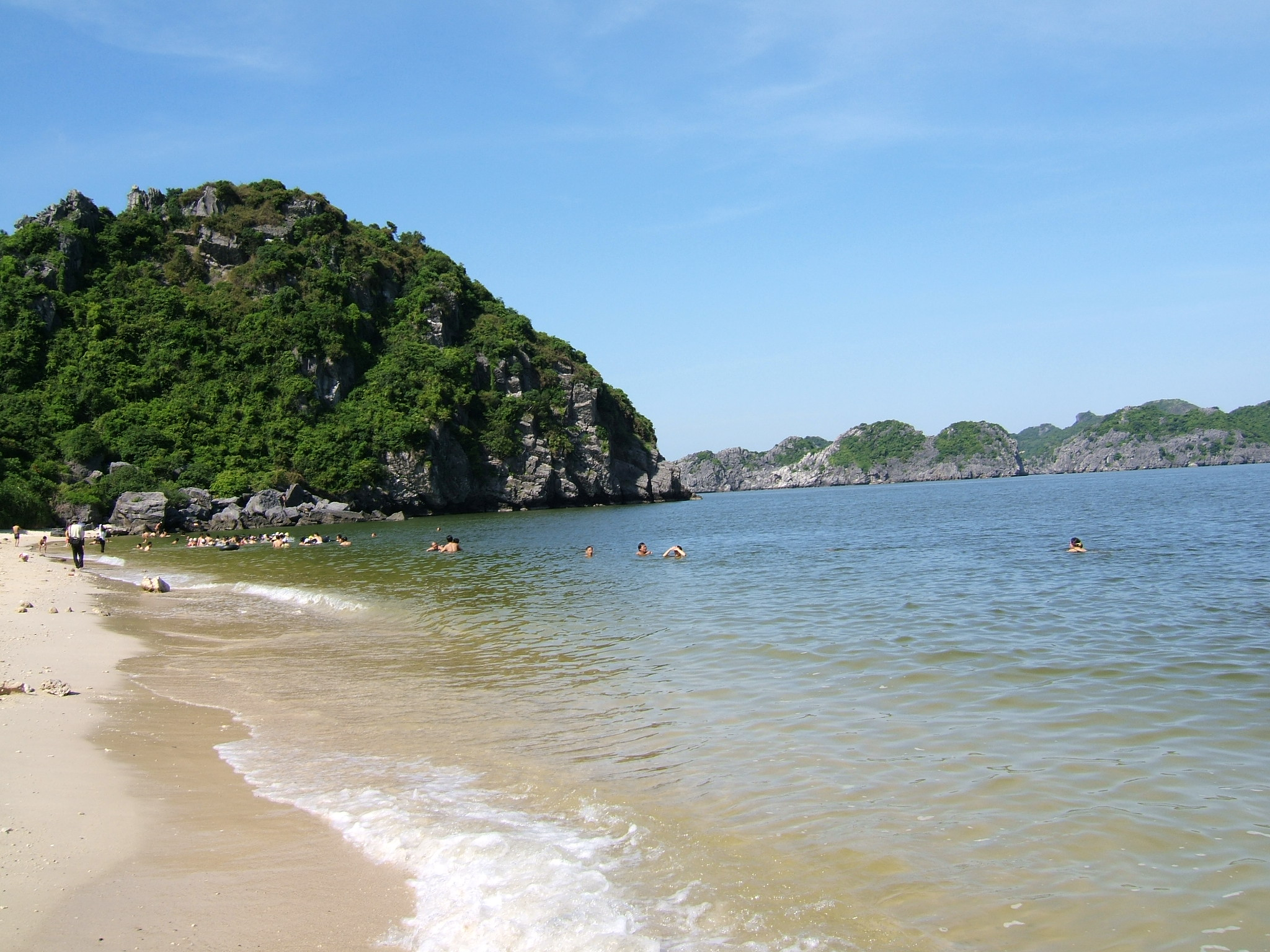 Bãi tắm trên đảo Khỉ (đảo nuôi thả rất nhiều khỉ) thuộc quần đảo Cát Bà